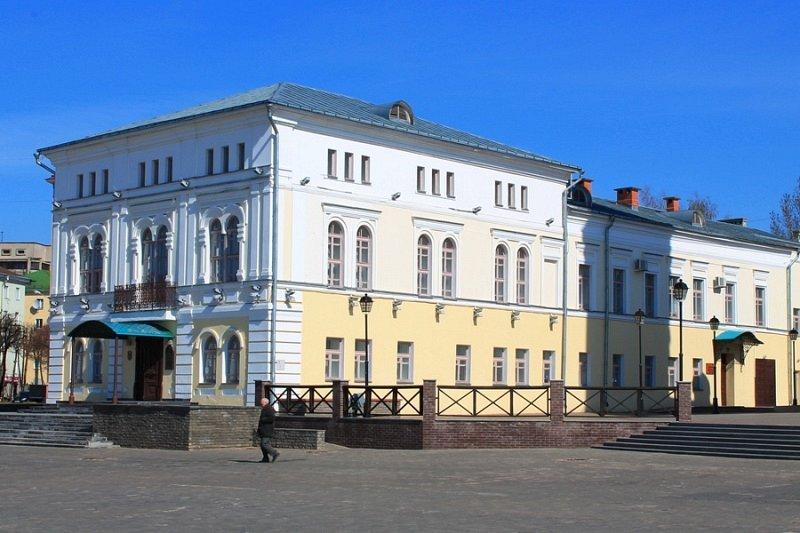 Гарадская ўправа. Магілёў